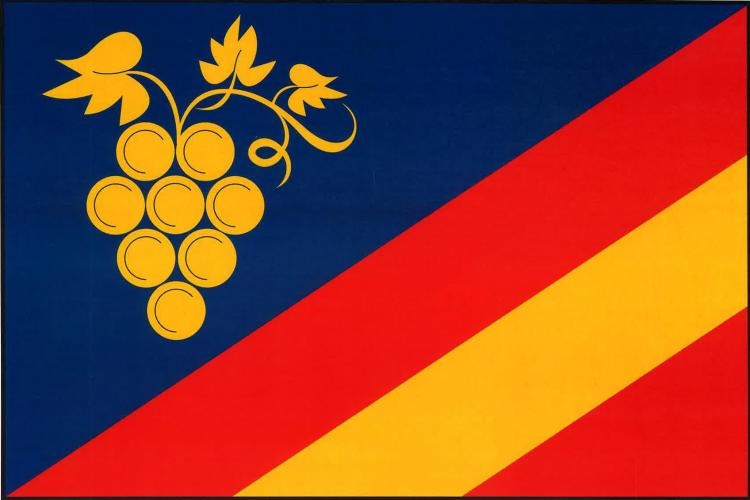 Těšetice, okres Znojmo, vlajka